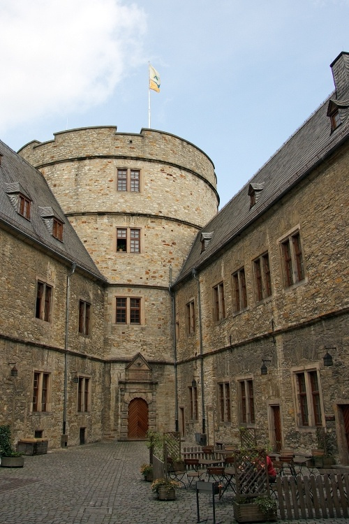 Innenhof der Wewelsburg